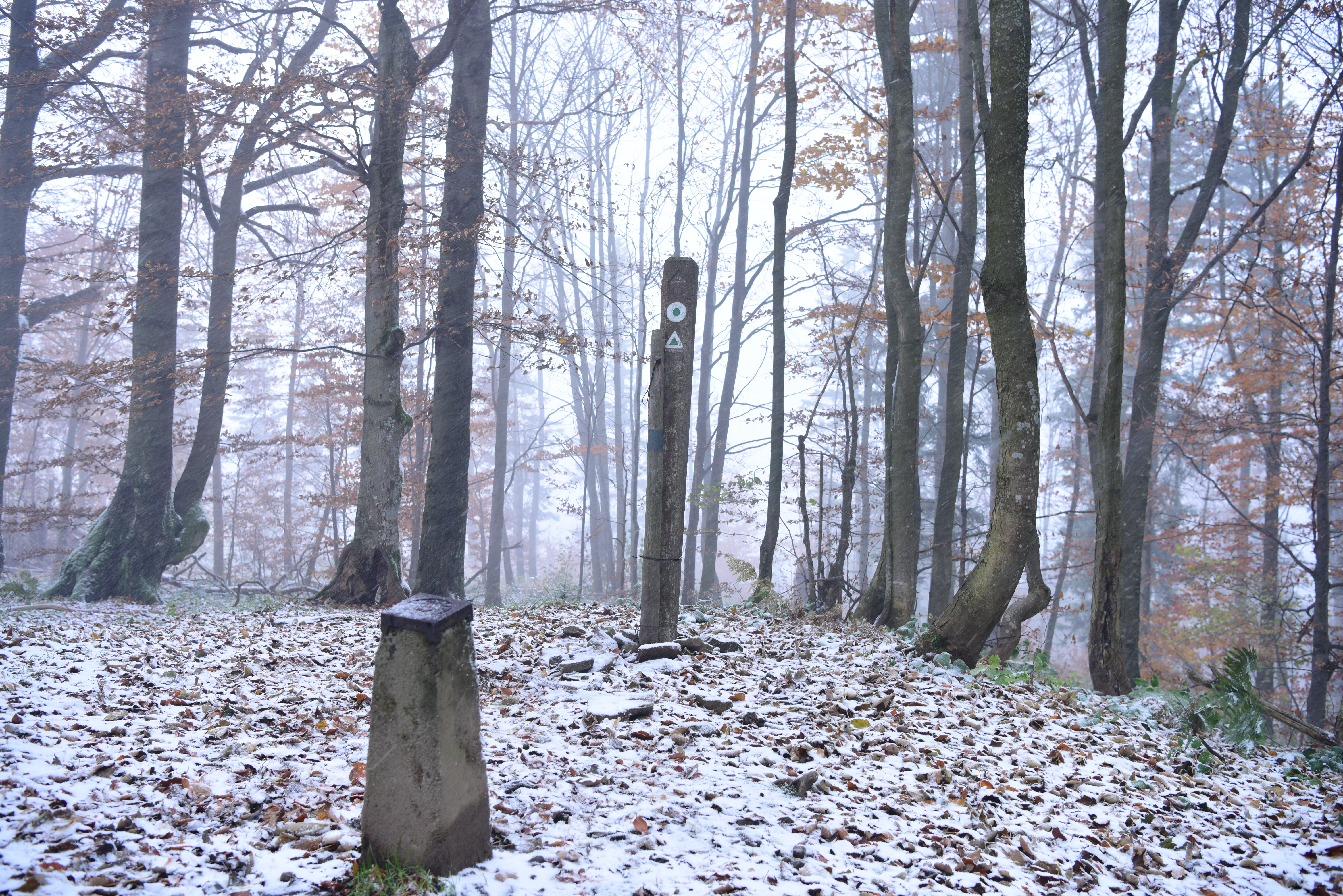 zdjęcie wykonanłem 30 października 2016